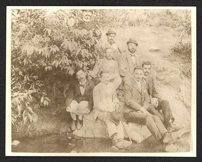 Пенчо Славейков, Анастас Иширков, инженер Йордан Иванов Данчев, Княжево, 1909 г.